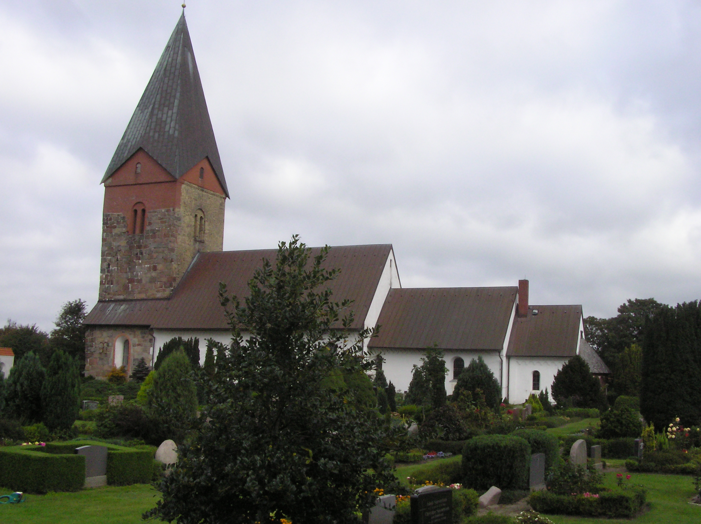 Kirche in Hattstedt(Schleswig-Holstein)